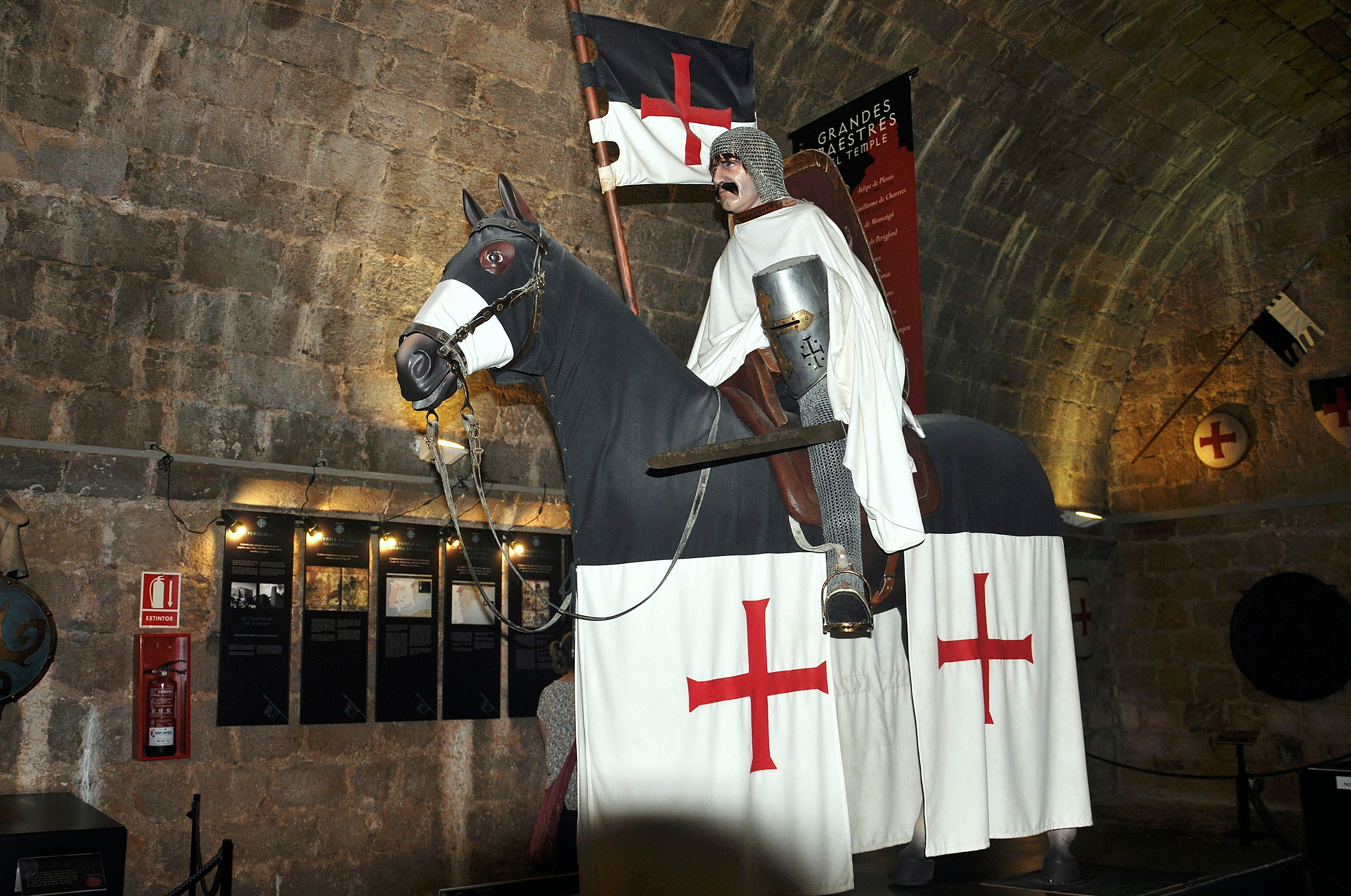 comunidad valenciana